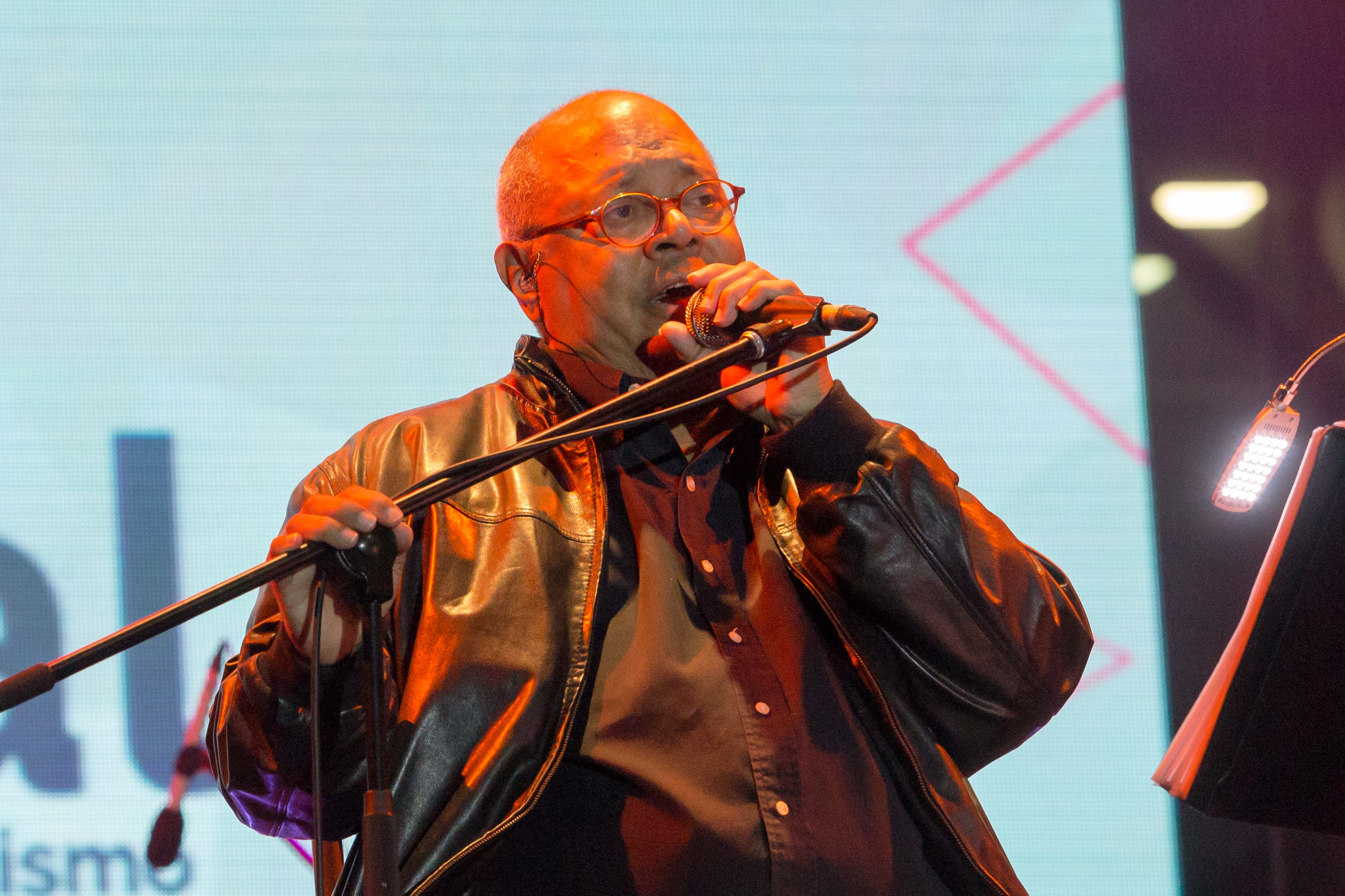 Premio Gabriel Barcia Marquez. Jueves 1 de octubre 2015 en Plaza Mayor, Medellín, Colombia. Concierto de Pablo Milanés. Realizado el jueves 1 de octubre en Parque de los pies descalzos, Medellín, Colombia.Foto: David Estrada Larrañeta /FNPI